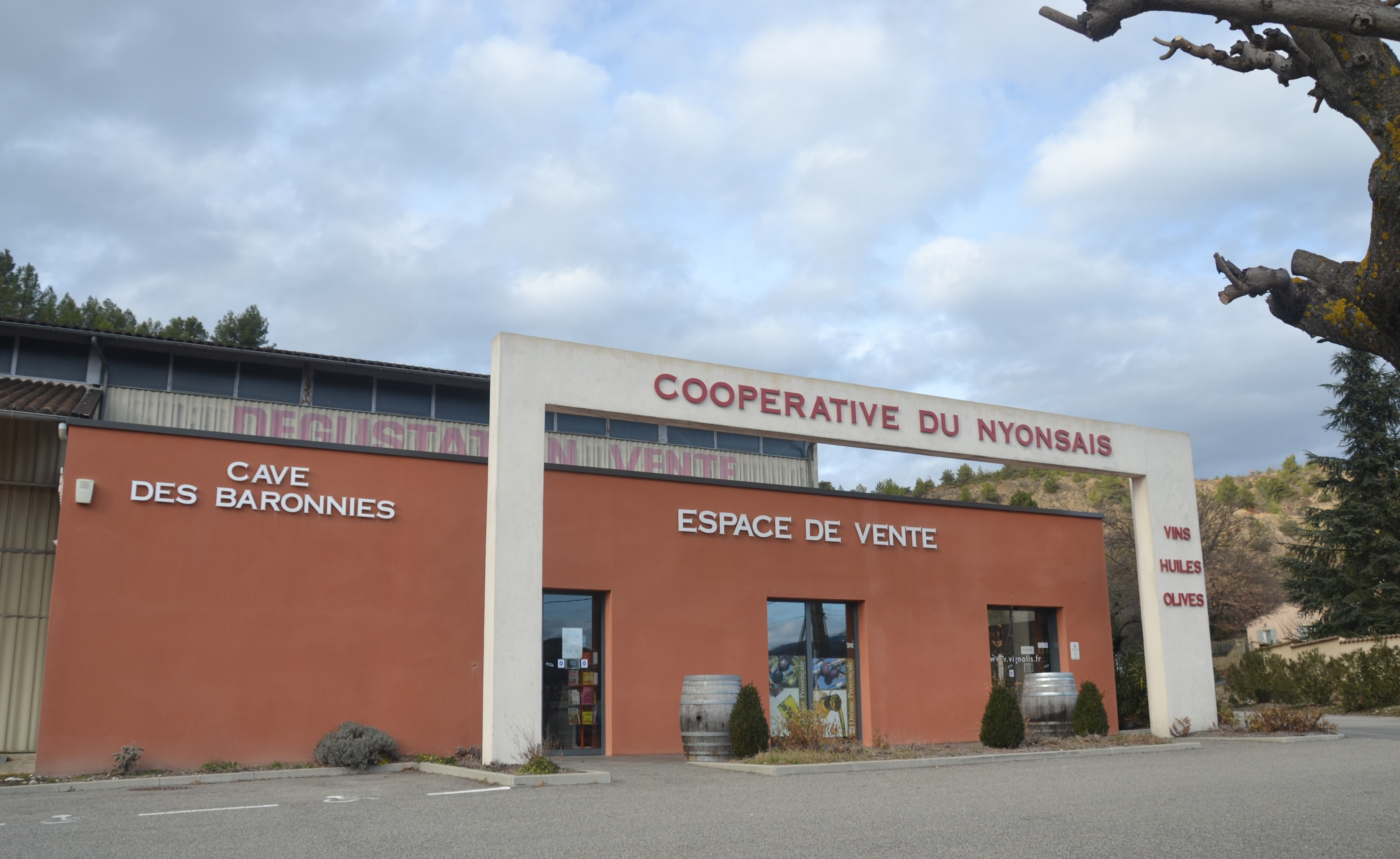 Cave coopérative oléicole et viticole du Nyonsais